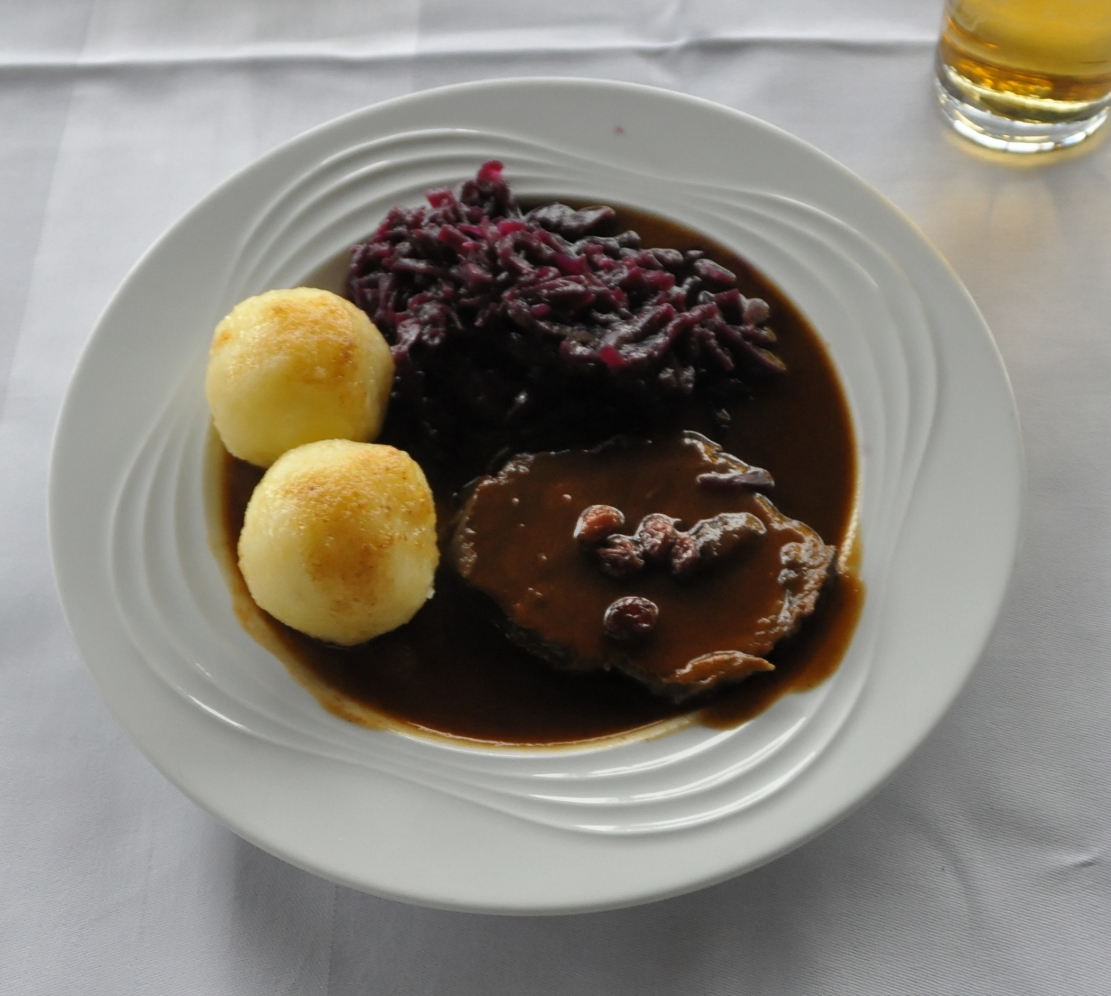 Bilder von Wiki Loves Monuments 2012 Kickoff-Seminar in Dresden